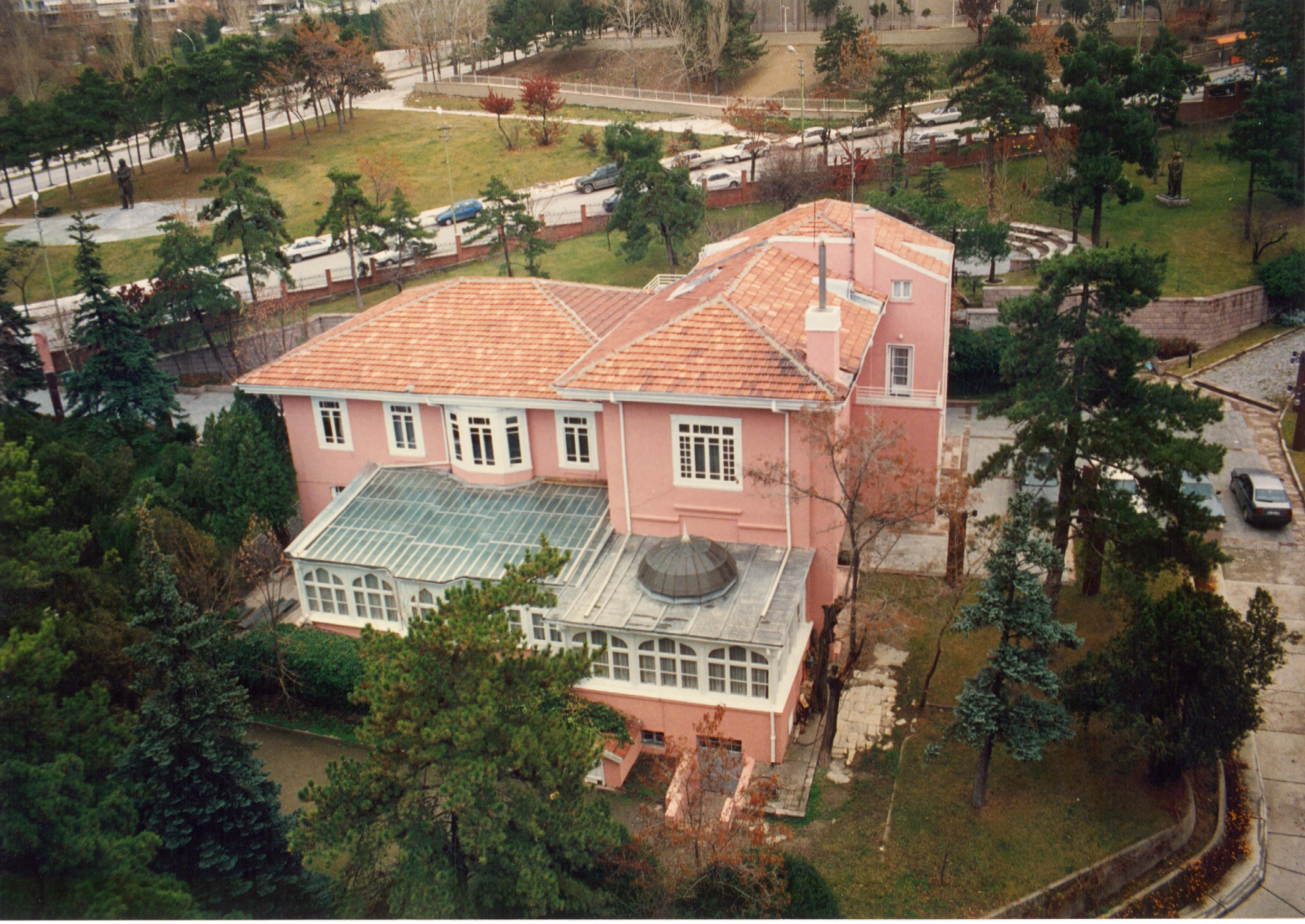 İsmet İnönü'nün 48 yılını geçirdiği Pembe Köşk Cumhuriyet Tarihimizin önemli bir mekanıdır.